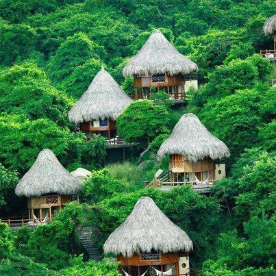 Thatched Roofs (Sierra Nevada de Santa Marta, Colombia)